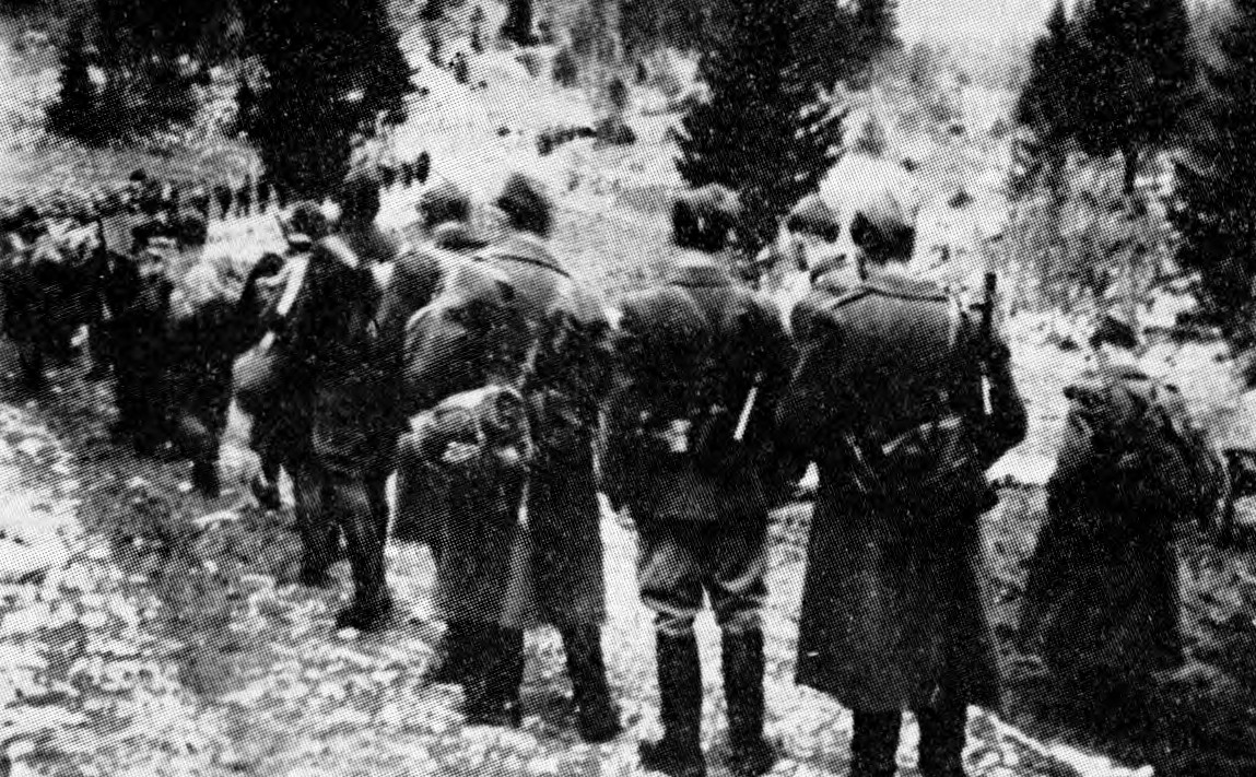 Kolona 30. divizije na poti s Kozjih sten proti Vojskemu.